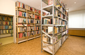 Archiv Frau und Musik Frankfurt/Main - Innenräume